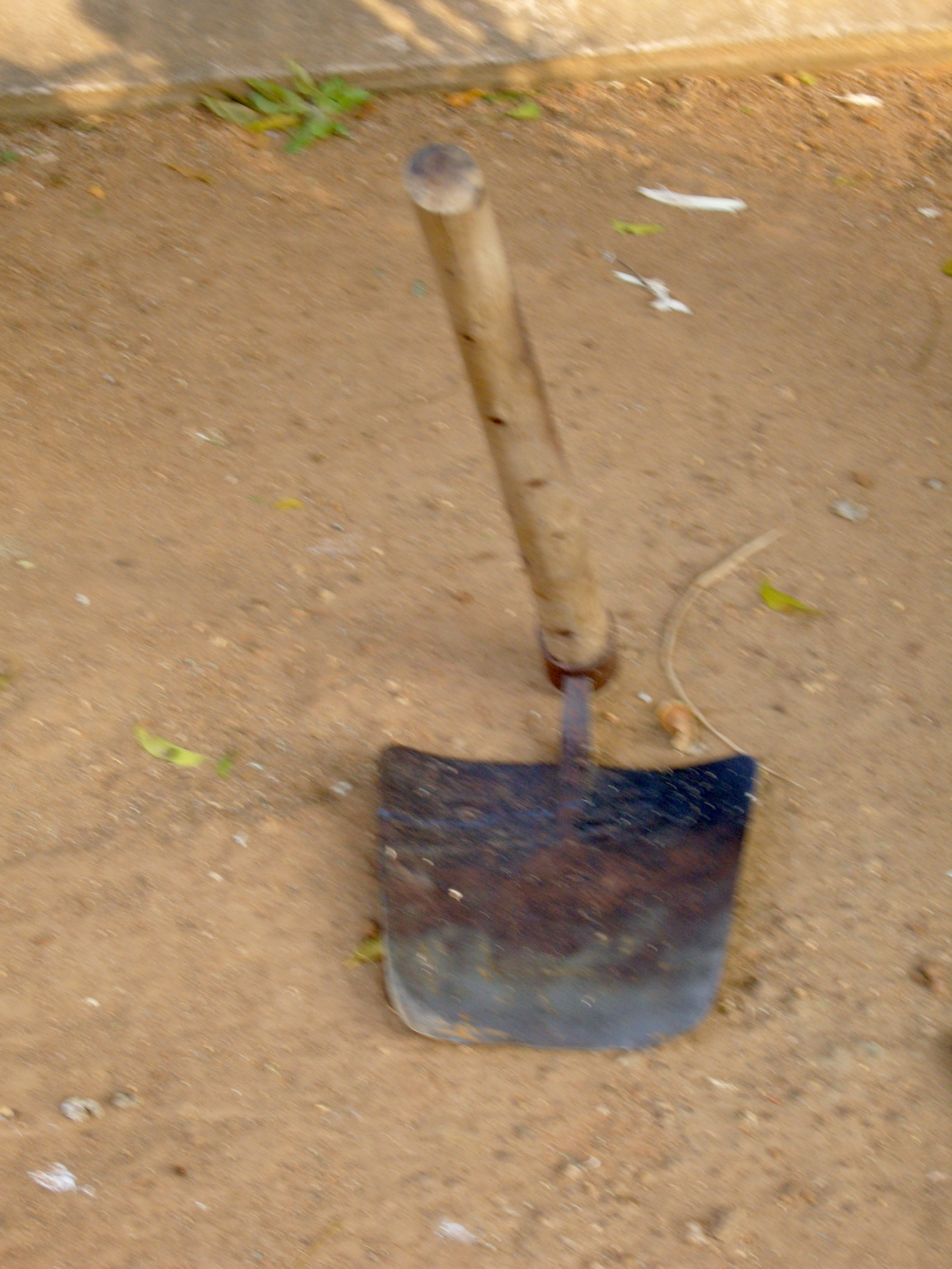 இந்த நிழற்படம் என்னால் எடுக்கப்பட்டது. பொதுப்பயன்பாட்டுக்கு வெளியிடுகிறேன்.--Ravidreams 22:54, 4 மார்ச் 2007 (UTC) -- Template:வார்ப்புரு:Cc-by-sa